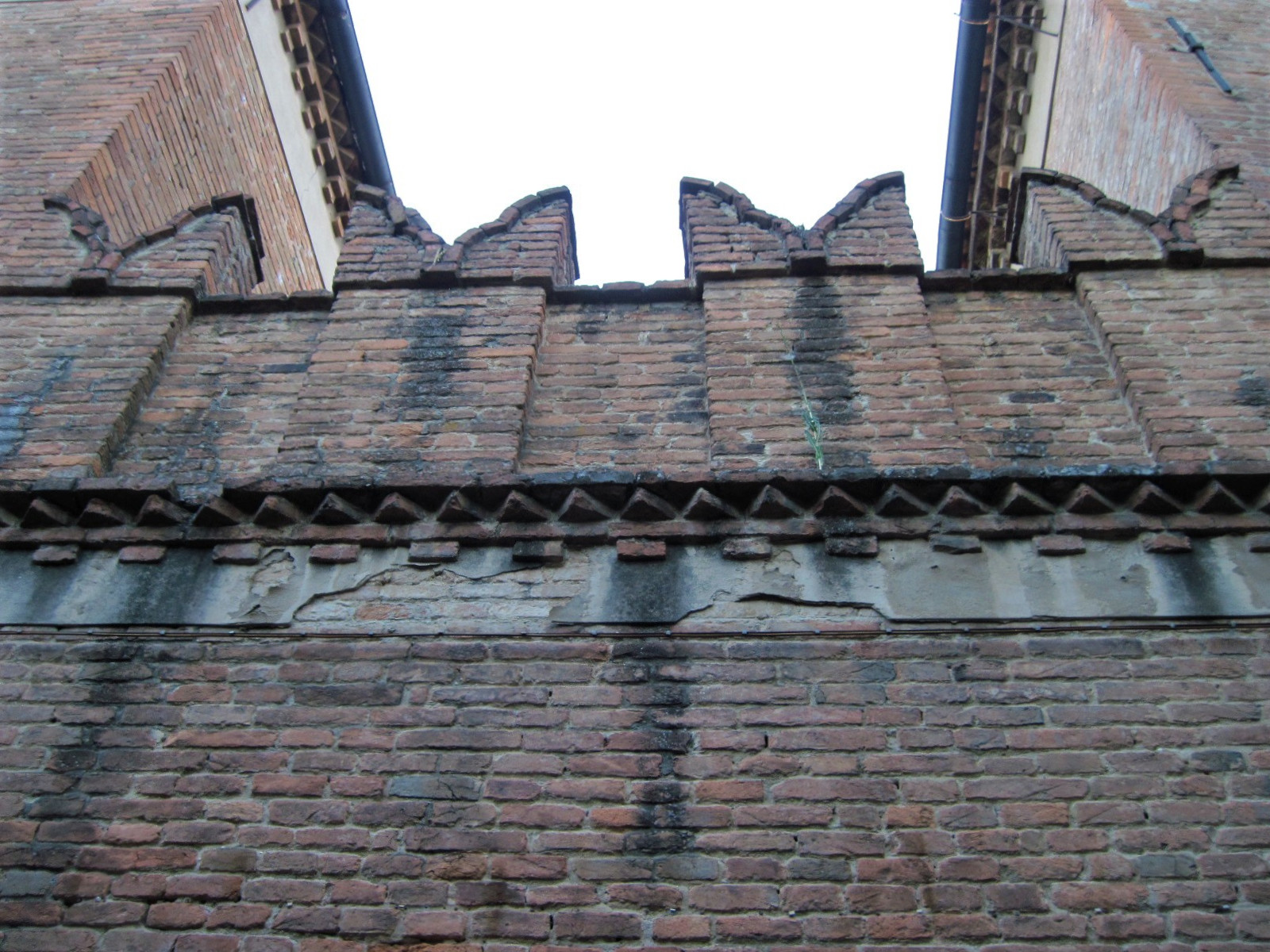 La merlatura visibile in via Voltacasotto